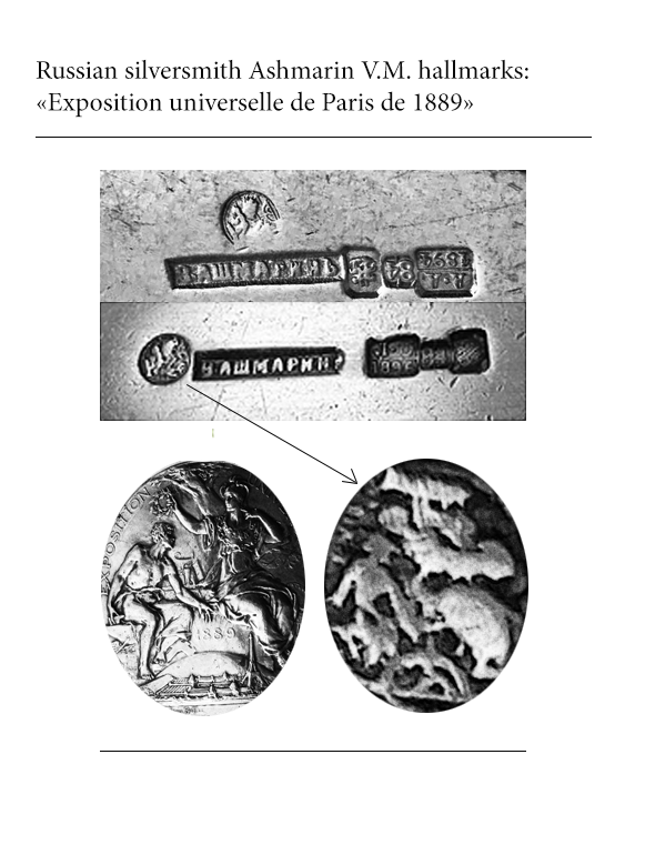 Ашмарин В.М. клеймо (миниатюра наградной бронзовой медали 1899)